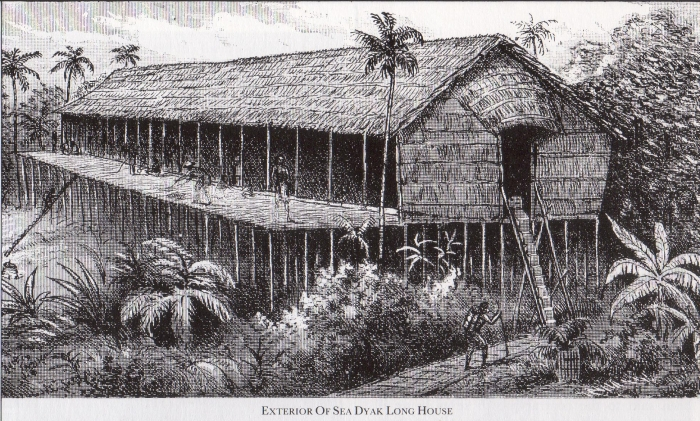 Langhaus der Iban. Illustration von 1896.